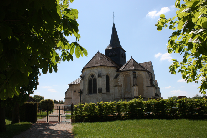 Église Saint-Quentin du Meix-Tiercelin (Inscrit) .